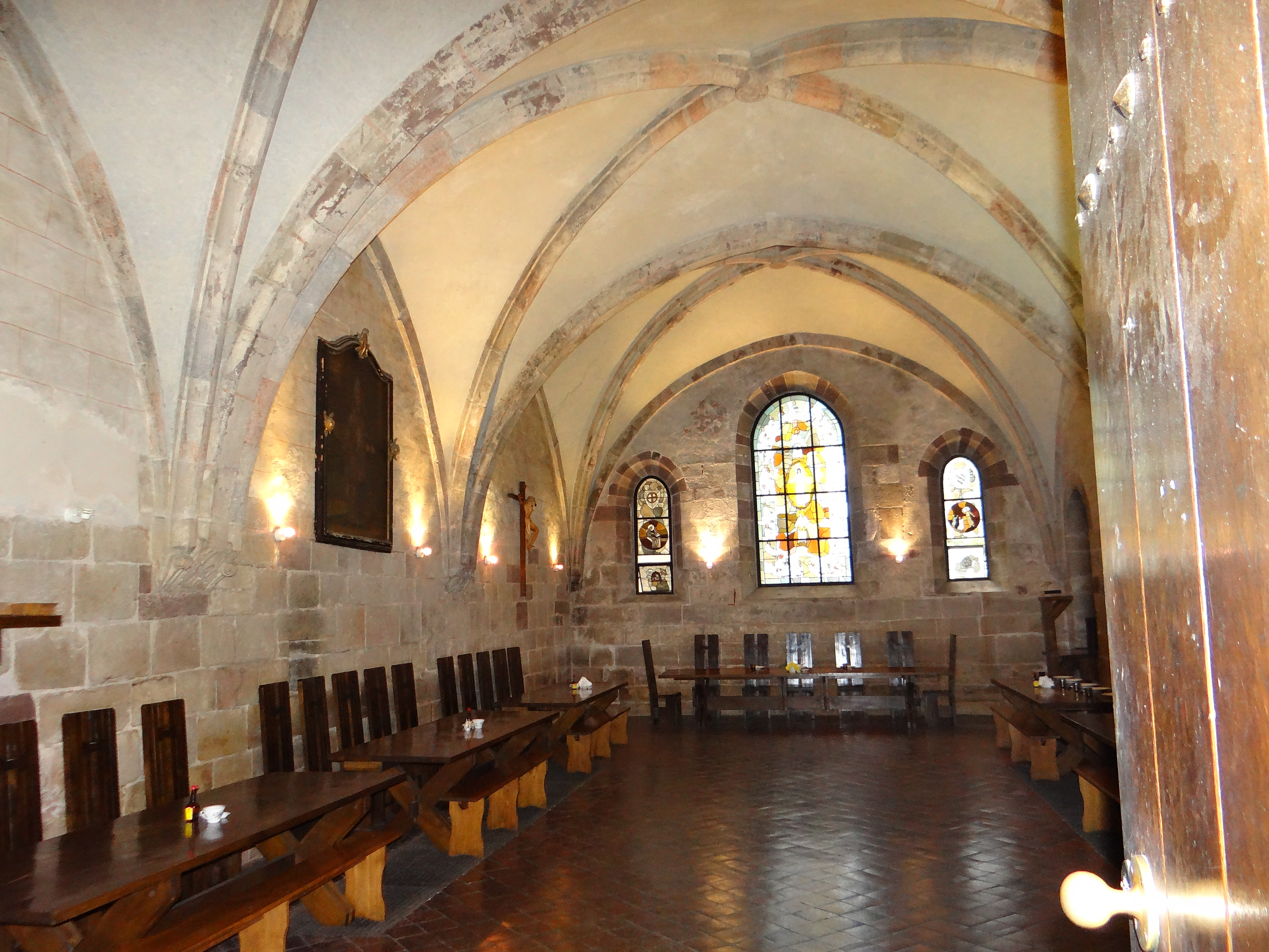 Klasztor Cystersów w Wąchocku - refektarz